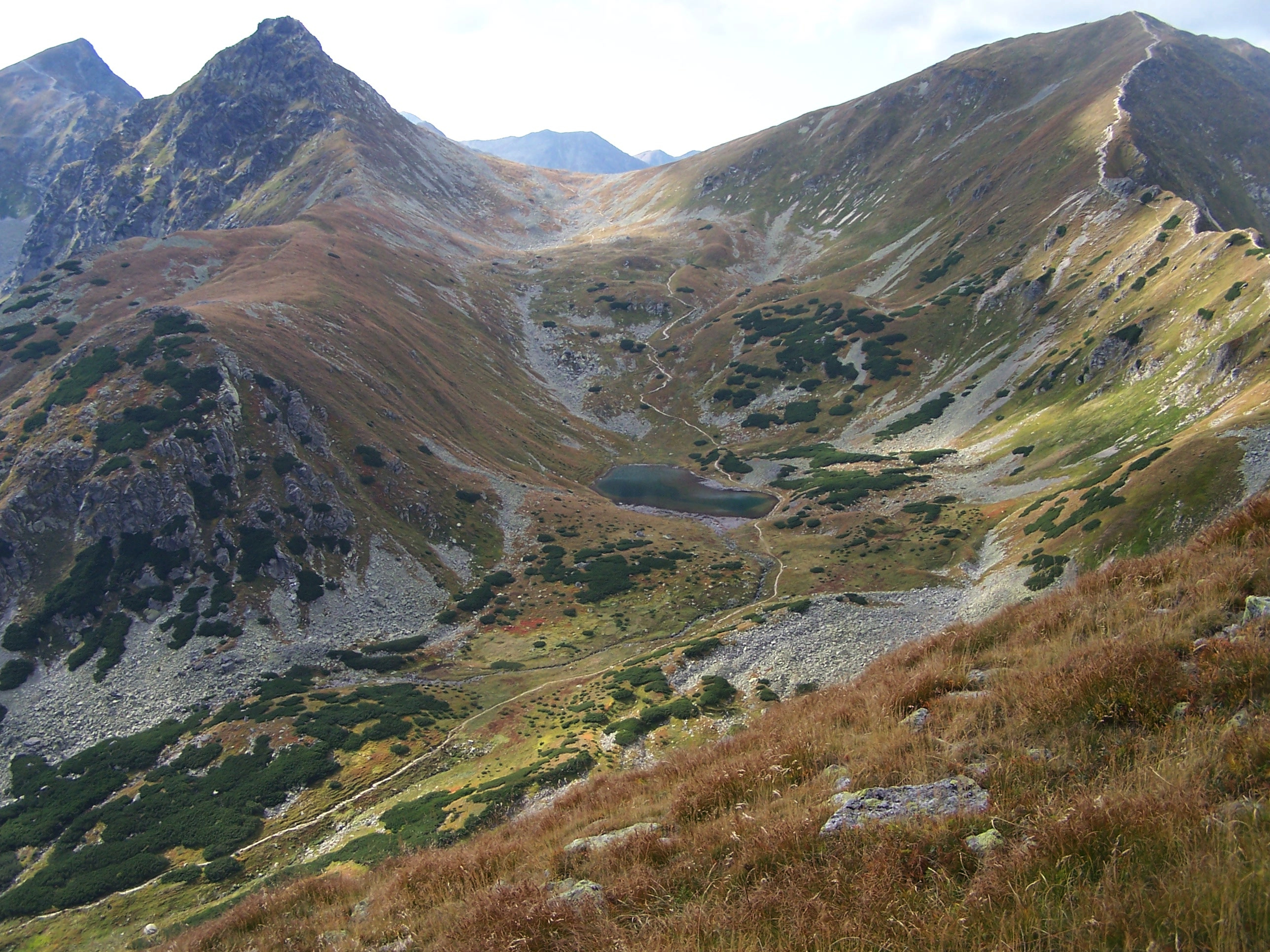 Jamnickie Stawy, Rohacze, Wołowiec (West Tatra Mountains)